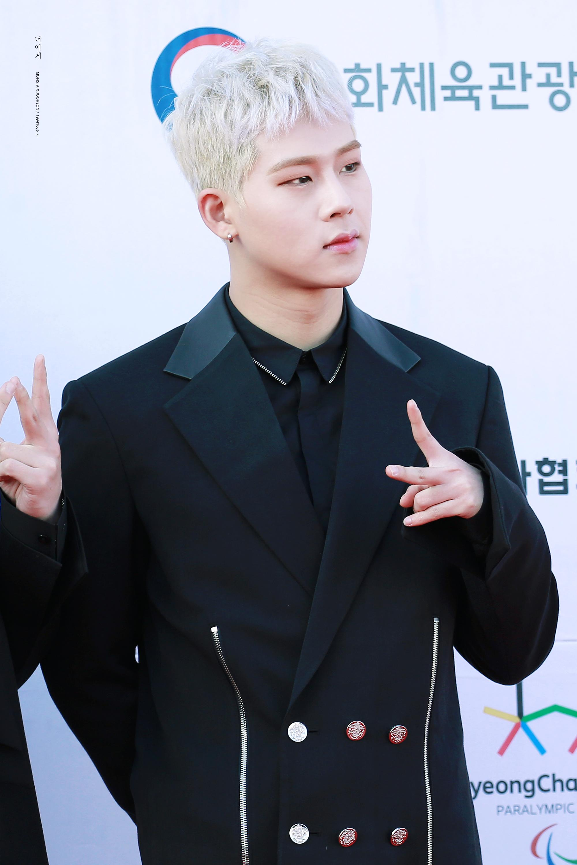 171104 드림콘서트